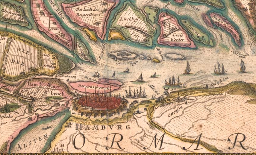 Hamburg um 1645, Kartenausschnitt von Landkarte 1645, Author: Johannes Blaeu, niederländischer Kartograf